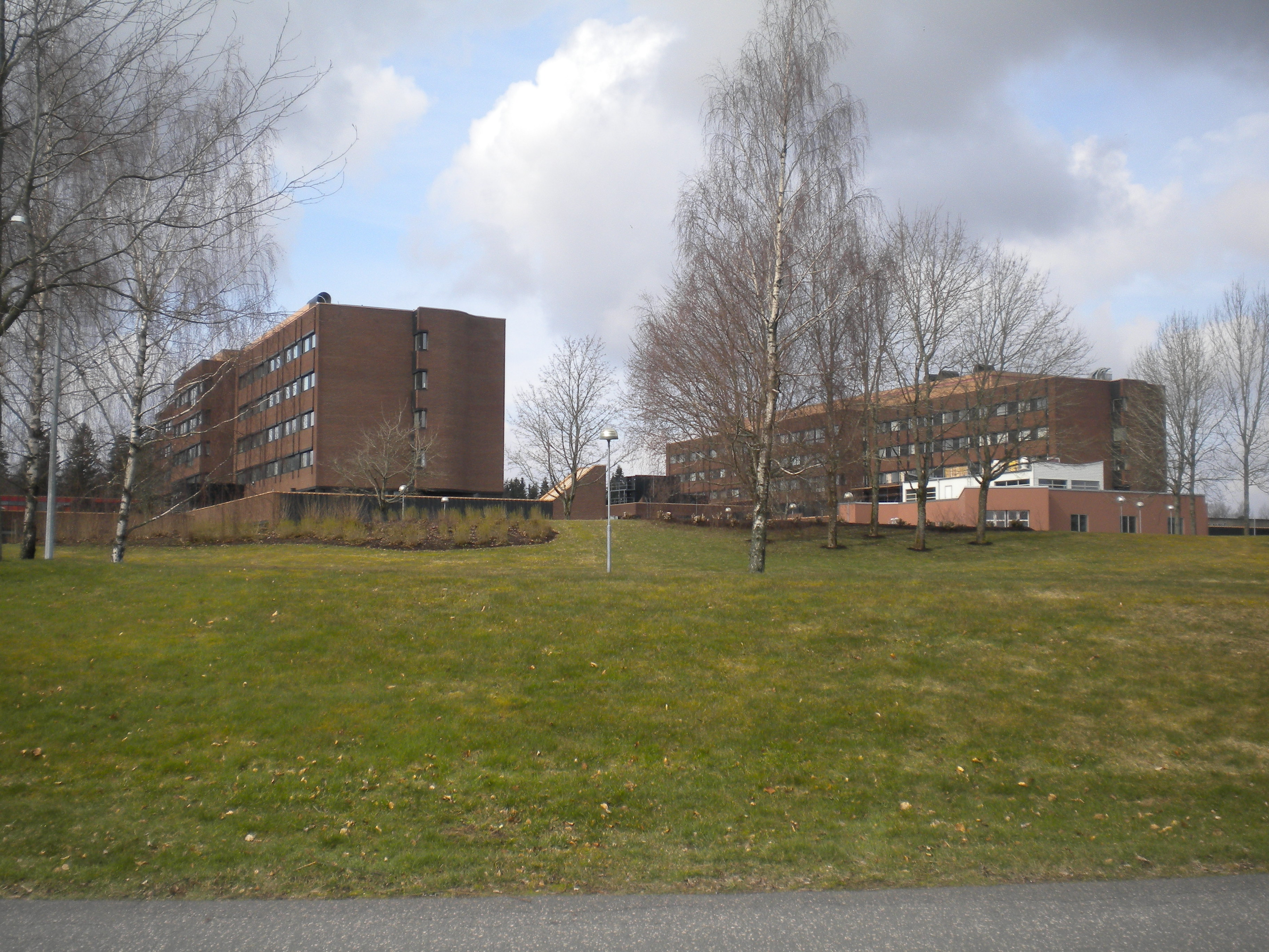 Delar av nya lasarettet i Värnamo.